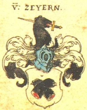 Wappen des fränkischen Adel- und Rittergeschlechts Zeyern.